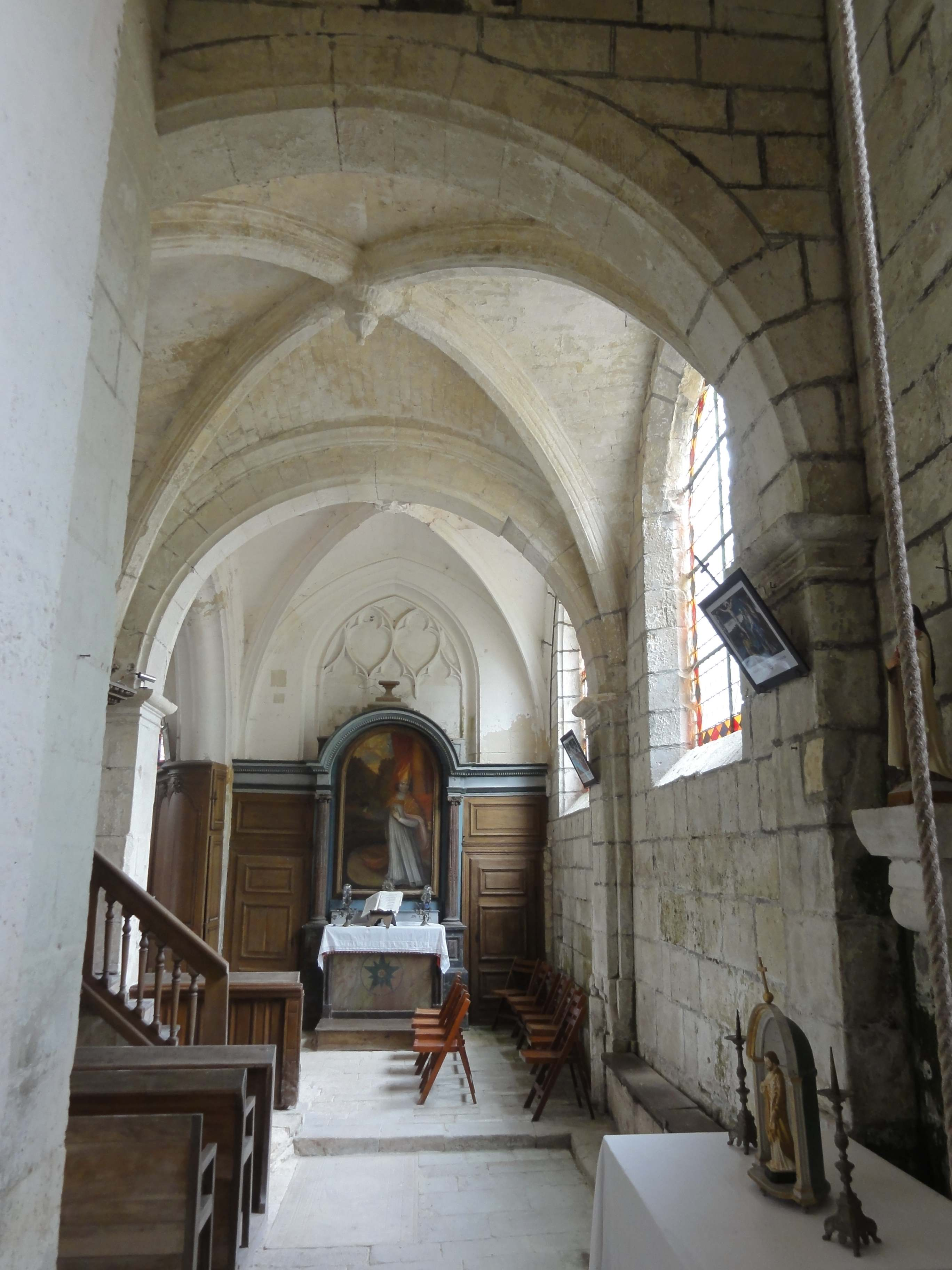 Intérieur de l'église (voir titre).